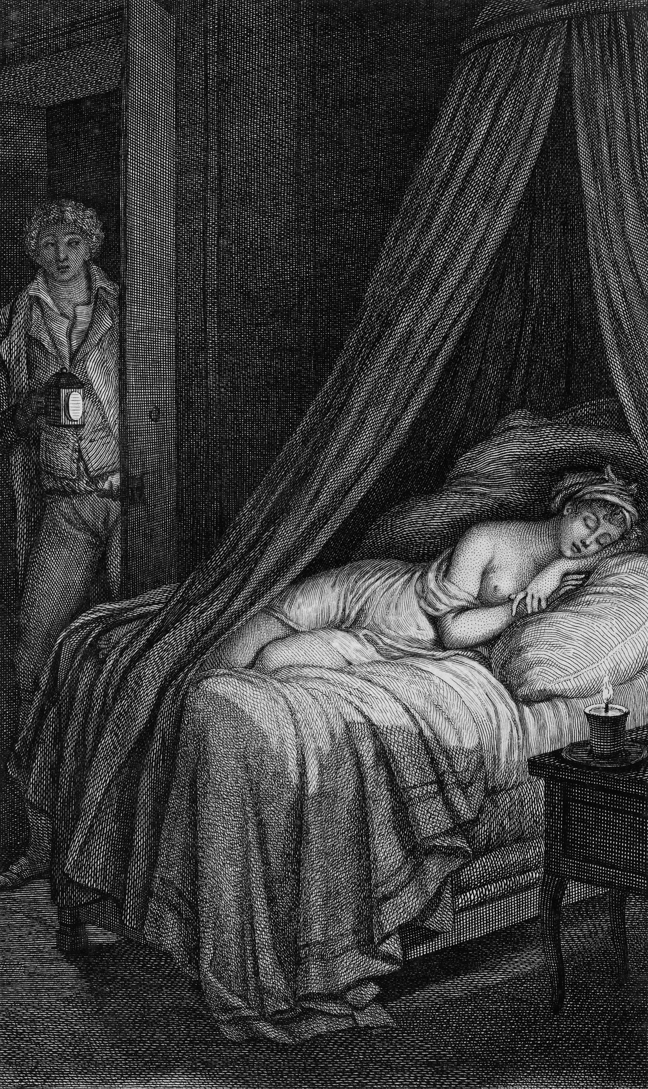 Illustration of Pierre Choderlos de Laclos' Dangerous Liaisons’ Letter 96 Valmont entrant dans la chambre de Cécile endormie